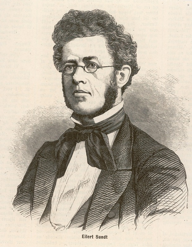 Norsk (bokmål): Portrett av Eilert Sundt, mann, brystbilde.